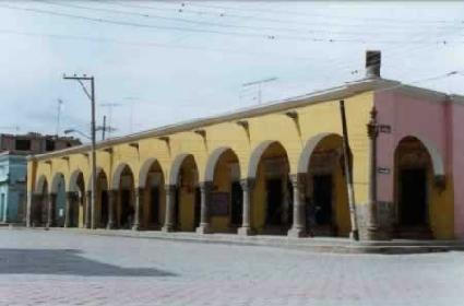 Portal Colonial que alberga el Museo Comunitario de Tecolotlán, Jalisco, México.